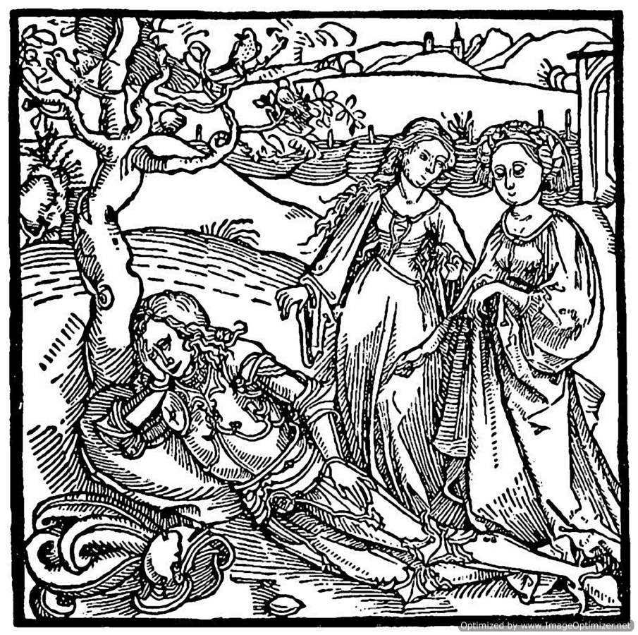 Der Ritter vom Turn. Basel: Michael Furter für J[ohann] B[ergmann], 1493. Reprint: Kautzsch, Rudolf. Die Holzschnitte zum Ritter vom Turn (Basel 1493). Strasbourg: Heitz & Mündel, 1903.